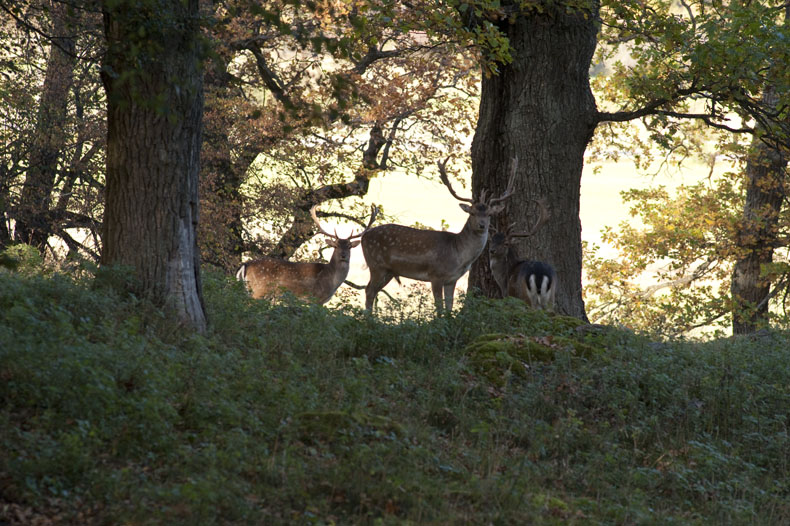 Naturreservatet Gripsholms hjorthage. Hjorthagen är ett stort inhägnat område intill Gripsholms slott, hela reservatet används som betesmark för cirka 100 dovhjortar. Motiv: Mariefred Nyckelord: Naturreservat, Riksintressen Kategori: Betesmark Naturreservatet Gripsholms hjorthage. Hjorthagen är ett stort inhägnat område intill Gripsholms slott, hela reservatet används som betesmark för cirka 100 dovhjortar.